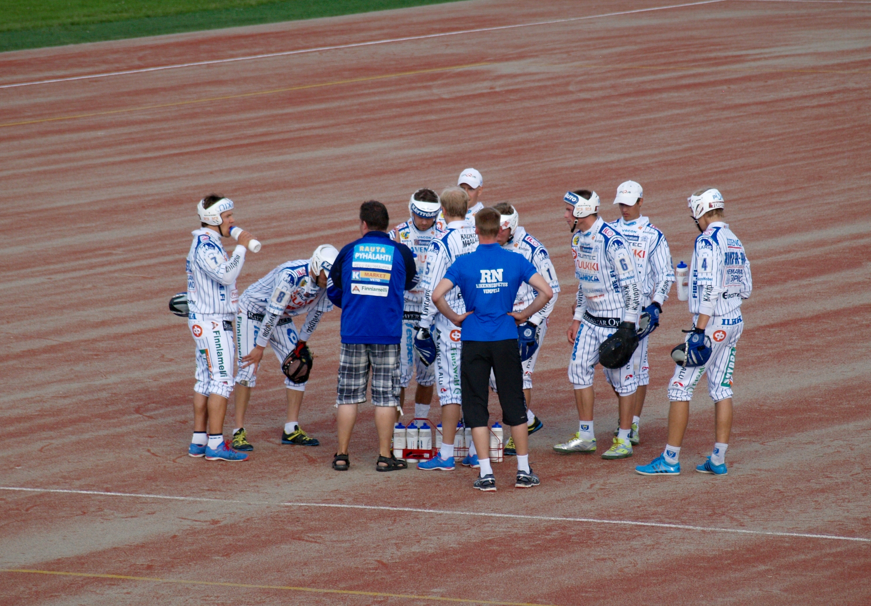 Vimpelin Veto - Koskenkorvan Urheilijat pesäpallo-ottelu 1.8.2014. Vimpelin Veto pitämässä aikalisää.